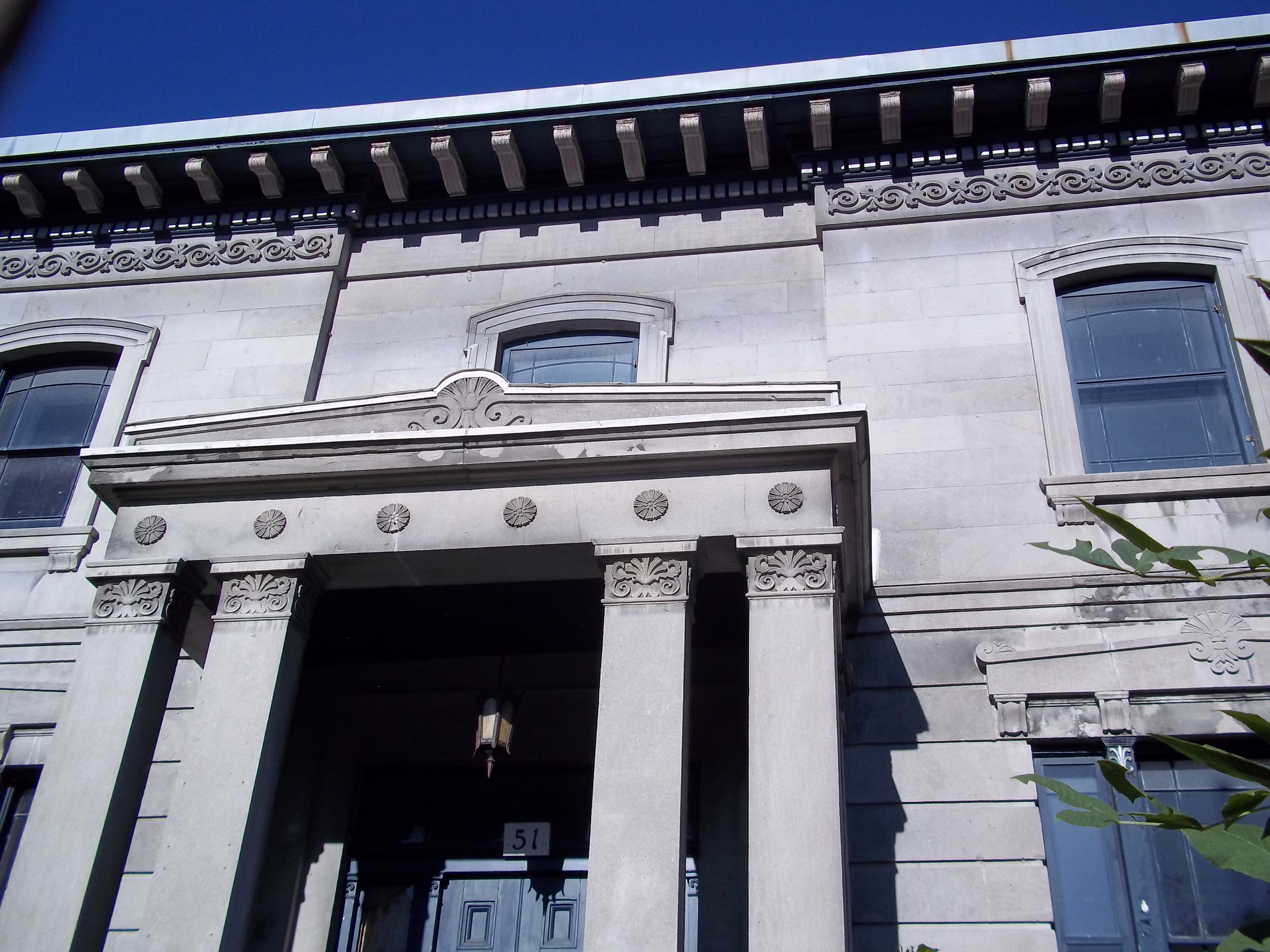 Maison William Collis-Meredith (Maison William-Notman), 51, rue Sherbrooke Ouest, Montréal Grand répertoire du patrimoine bâti de Montréal